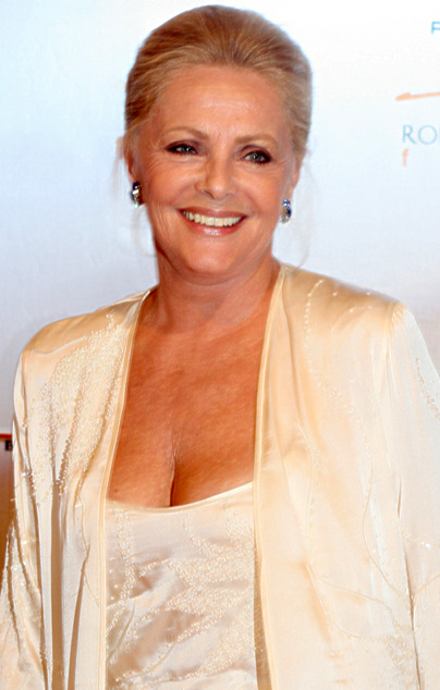 Virna Lisi, Italian actress